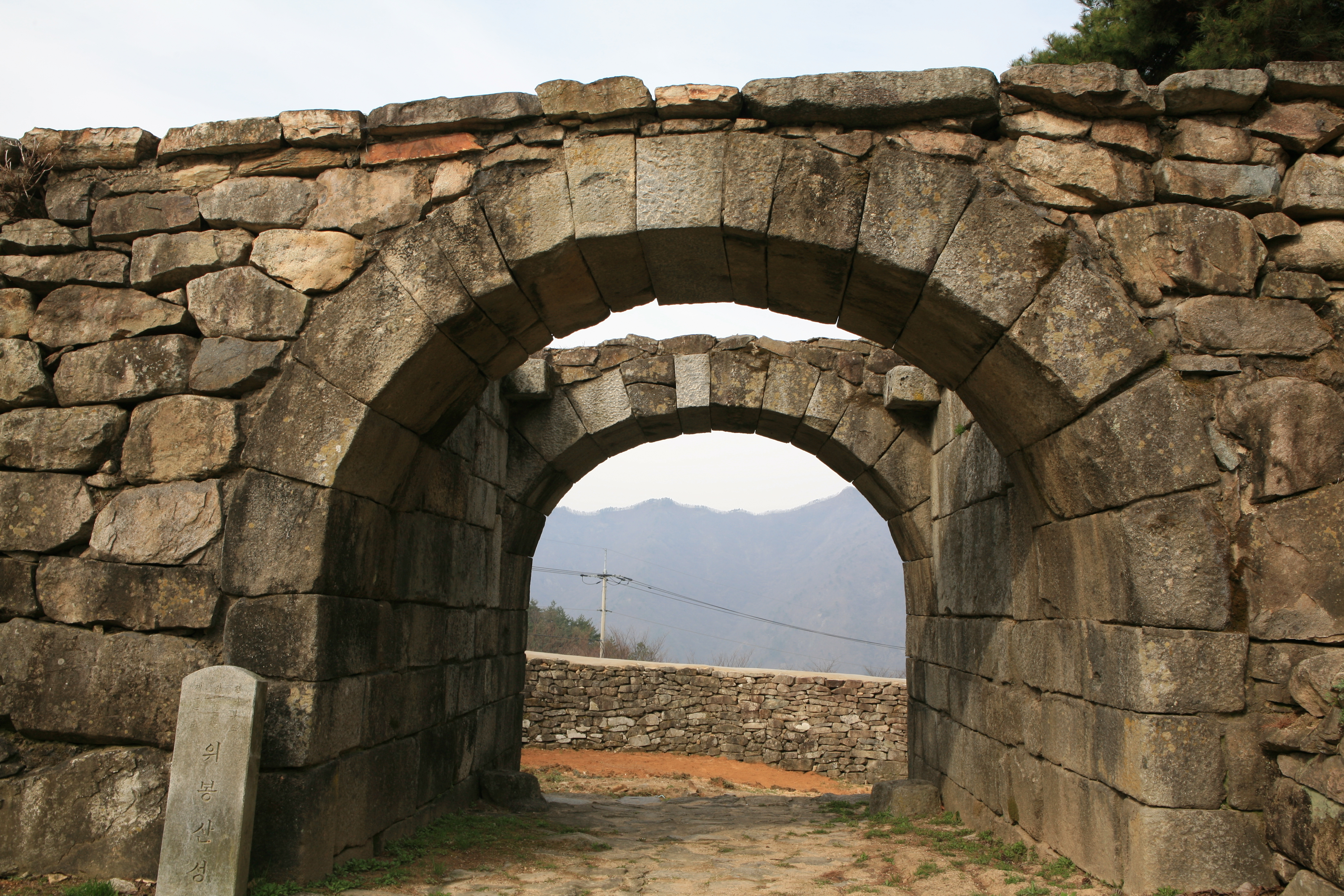 위봉산성의 4월